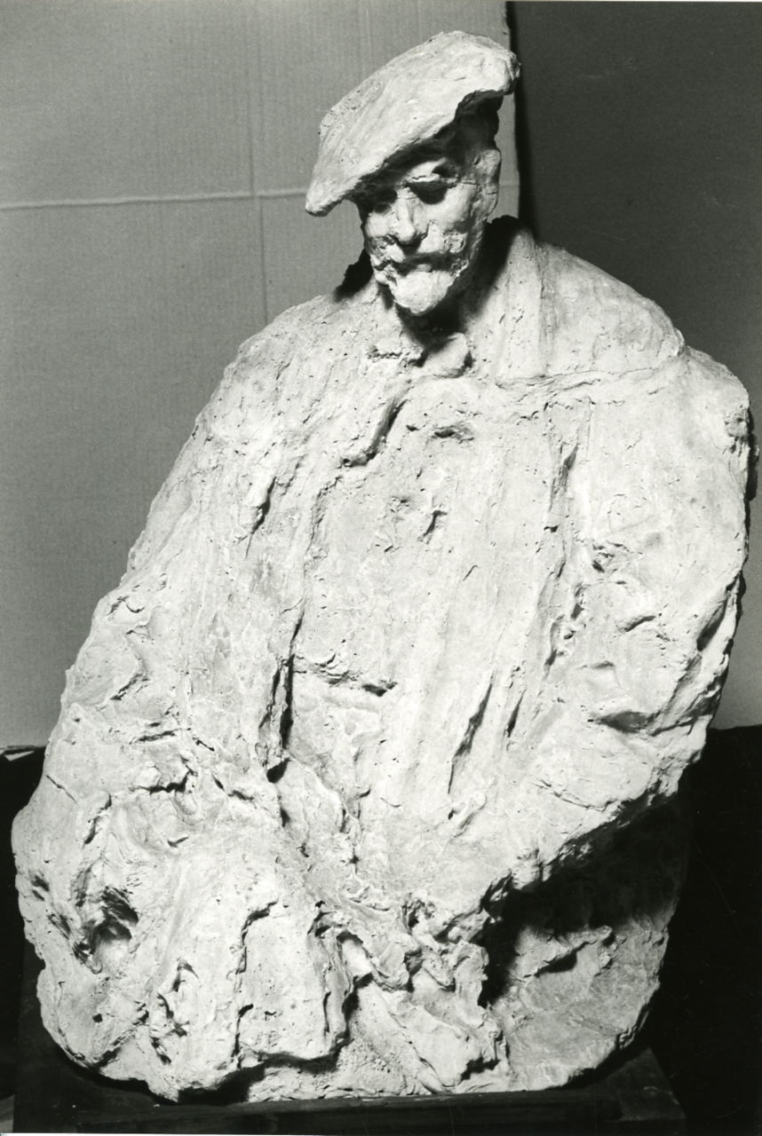 Servizio fotografico : Barzio, 1978 / Paolo Monti. - Stampe: 3 : Positivo b/n, gelatina bromuro d'argento/ carta, 24x30. - ((Al verso delle stampe manoscritto numero di negativo corrispondente: 32997/29, 3170/2. Sul coperchio della scatola manoscritto a pennarello nero: "Medardo Rosso". - Occasione: Documentazione per la pubblicazione del catalogo: "Medardo Rosso, 1858-19" , Ed. Der Kunstverein, 1984. - Fonte: Agenda di Paolo Monti: Nikon Leika 3001-/ Monti 1978 (1978-1982), presso Archivio Paolo Monti